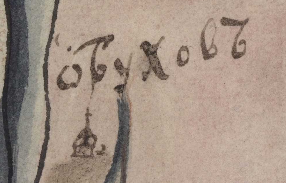 Фрагмент карти Київської губернії. XVIII століття. РГАДА, ф. 192, оп. 1, Киевская губ., № 5.